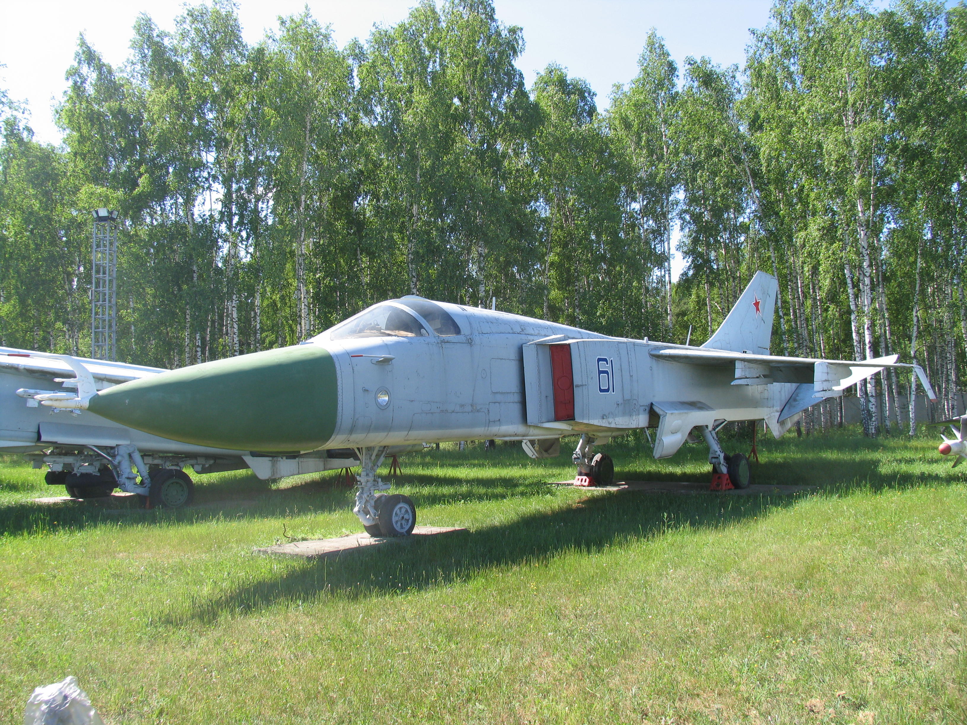 Т6-1 - первый прототип бомбардировщика Су-24 с треугольным крылом.